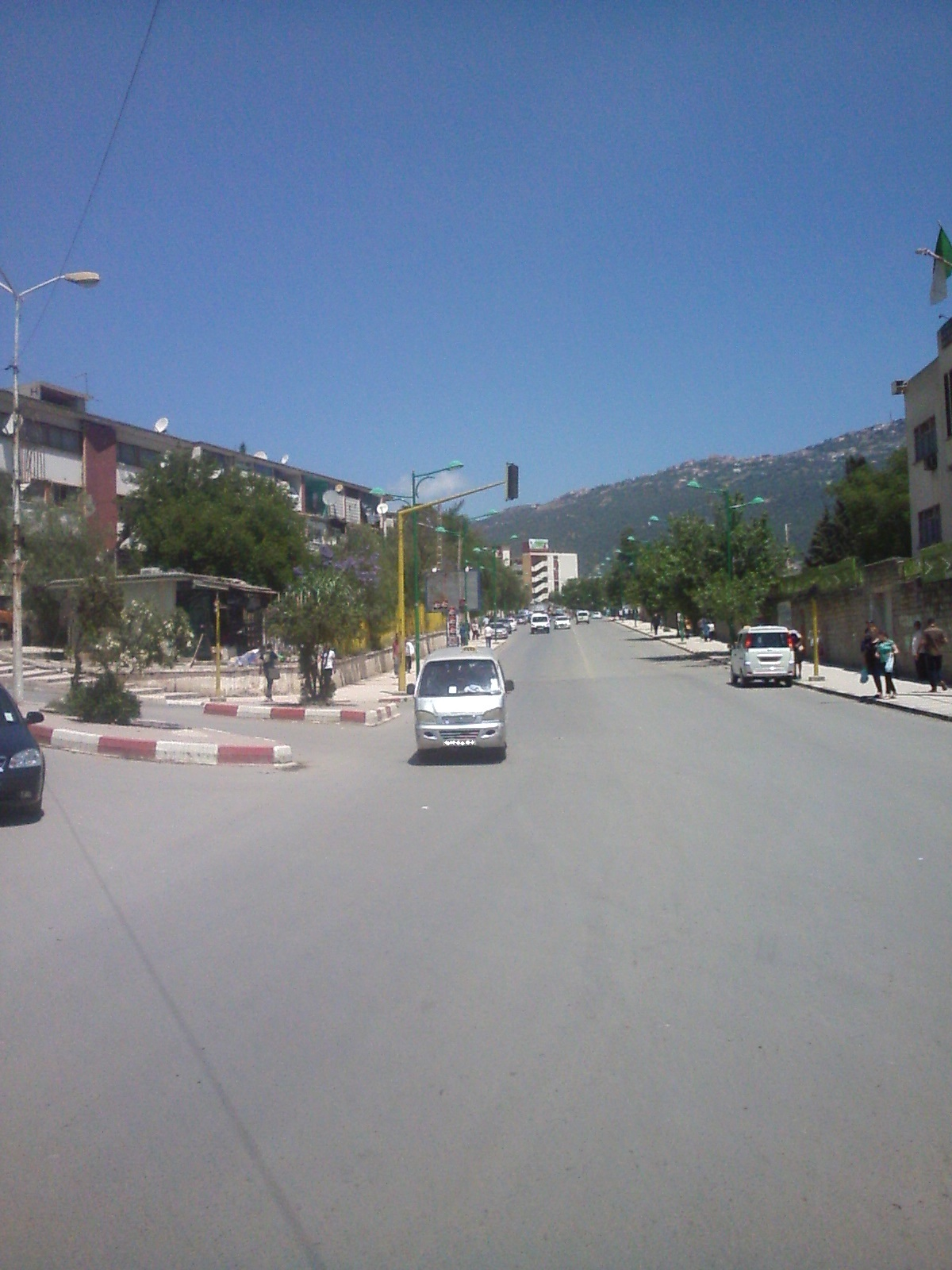 Carrefour juxtaposant le stade 1er Novembre 1954 à droite, entre les rues Lamali Ahmed en face, Amena Mahieddine à gauche, ainsi que les rues -non visibles- des frères Yacoub à droite et des frères Ouamrane.